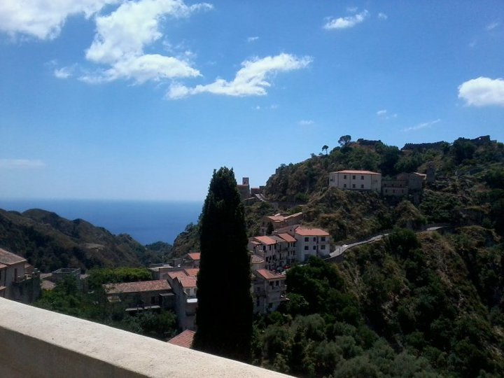 L'abitato di Savoca visto dal convento dei Cappuccini